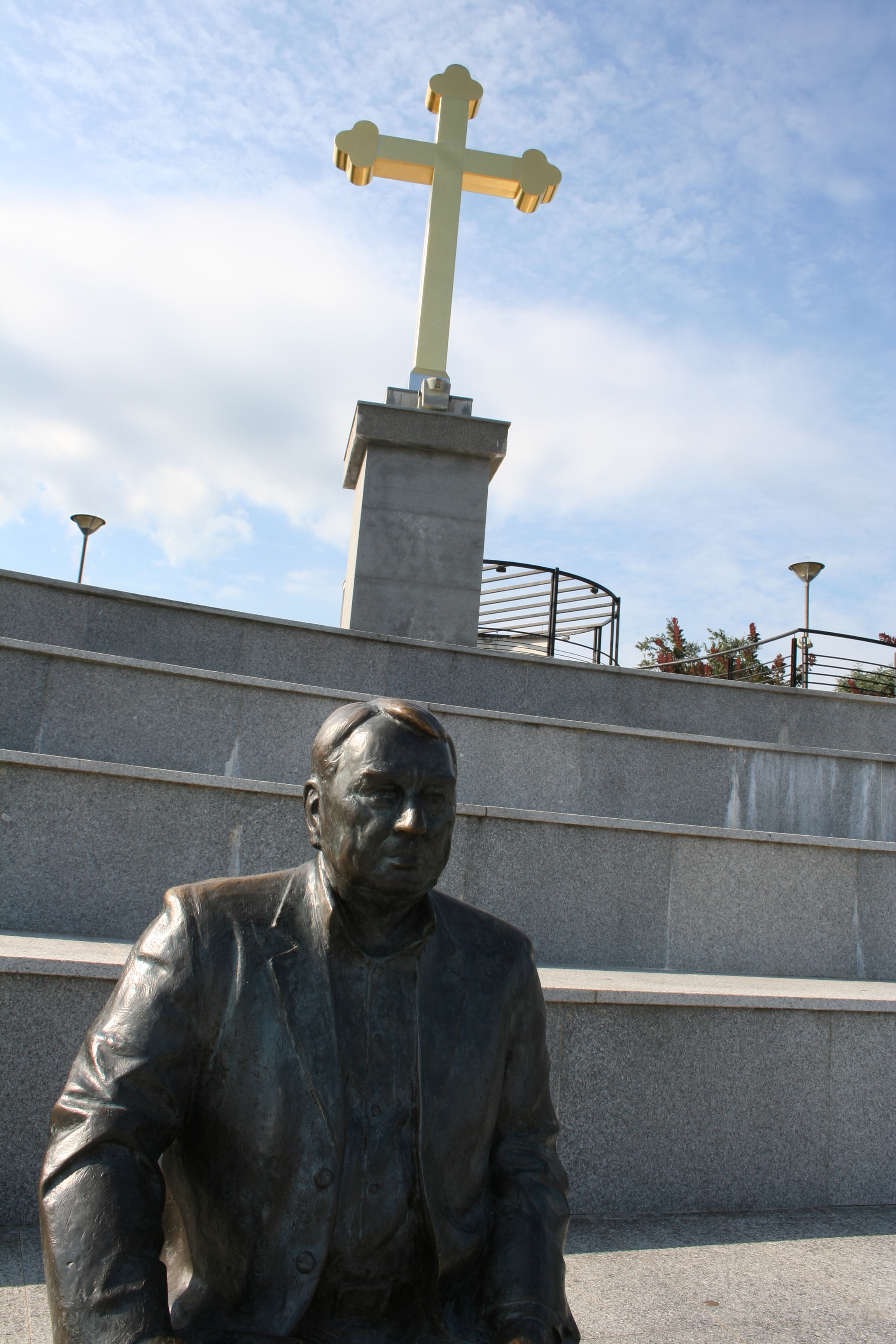 Vidikovac Sremski Karlovci